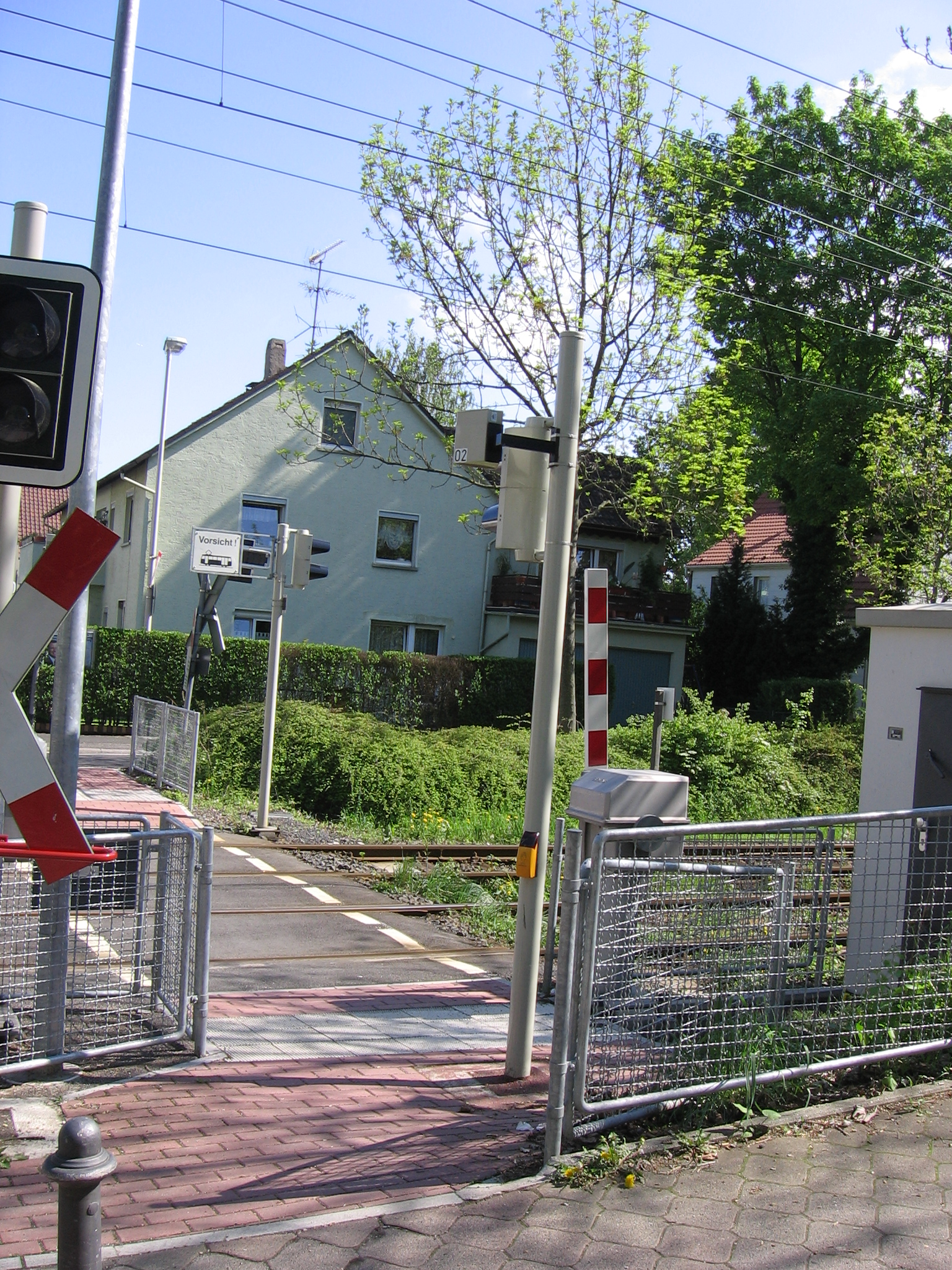 Querungshilfe am Bahnübergang Jakob-Lengfelder-Straße in Ober-Eschbach